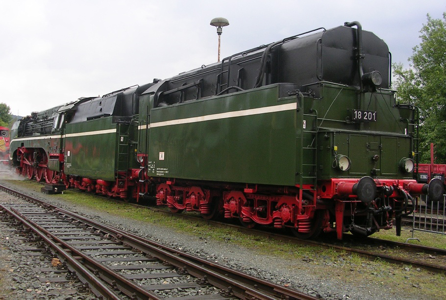 Deutsche Hochgeschwindigkeitsdampflokomotive Nr. 18 201 mit Doppeltender. 2017 im Dampflokwerk Meiningen